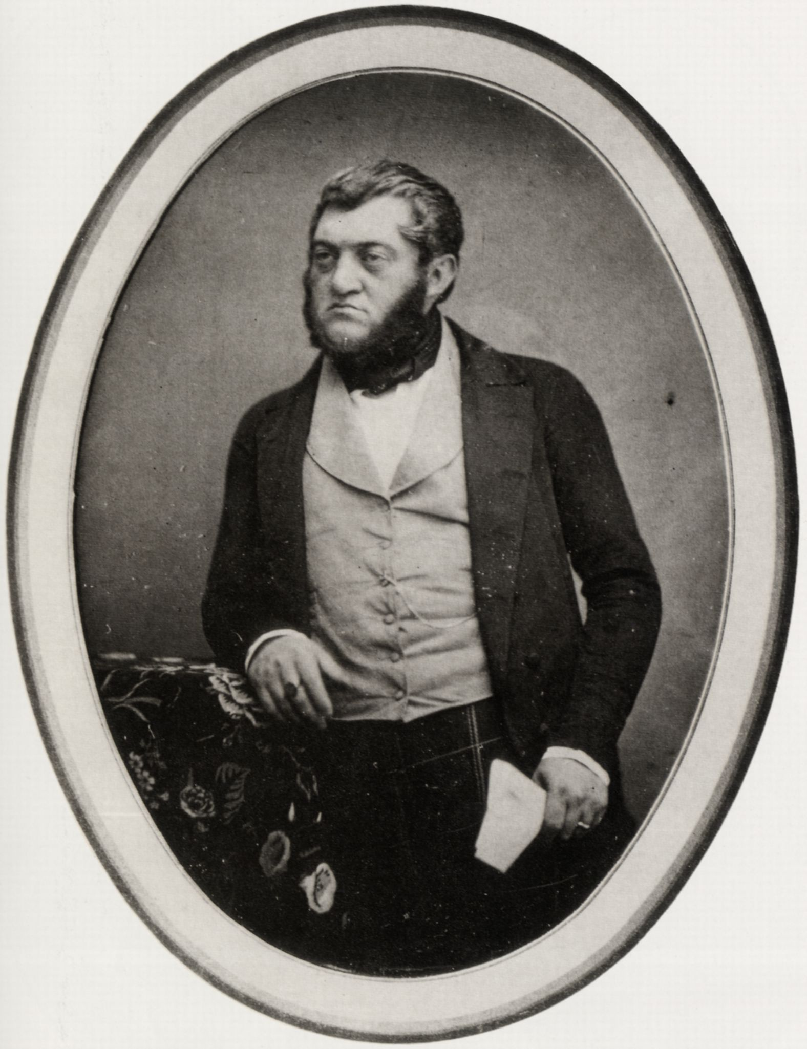 Seib, Jacob: Georg von Vincke, Abgeordneter des 13. Westfälischen Wahlbezirks, Frankfurt